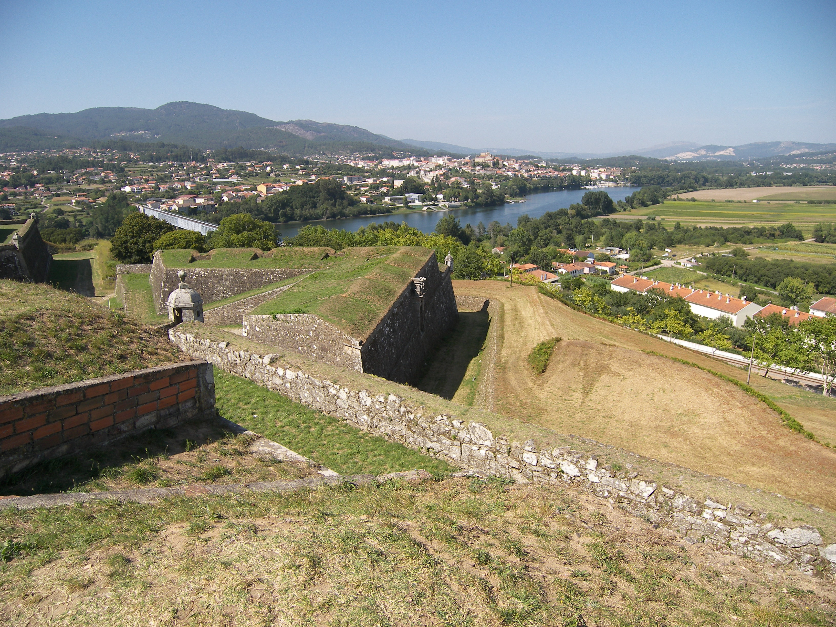 Blick von der Festung auf den Minho